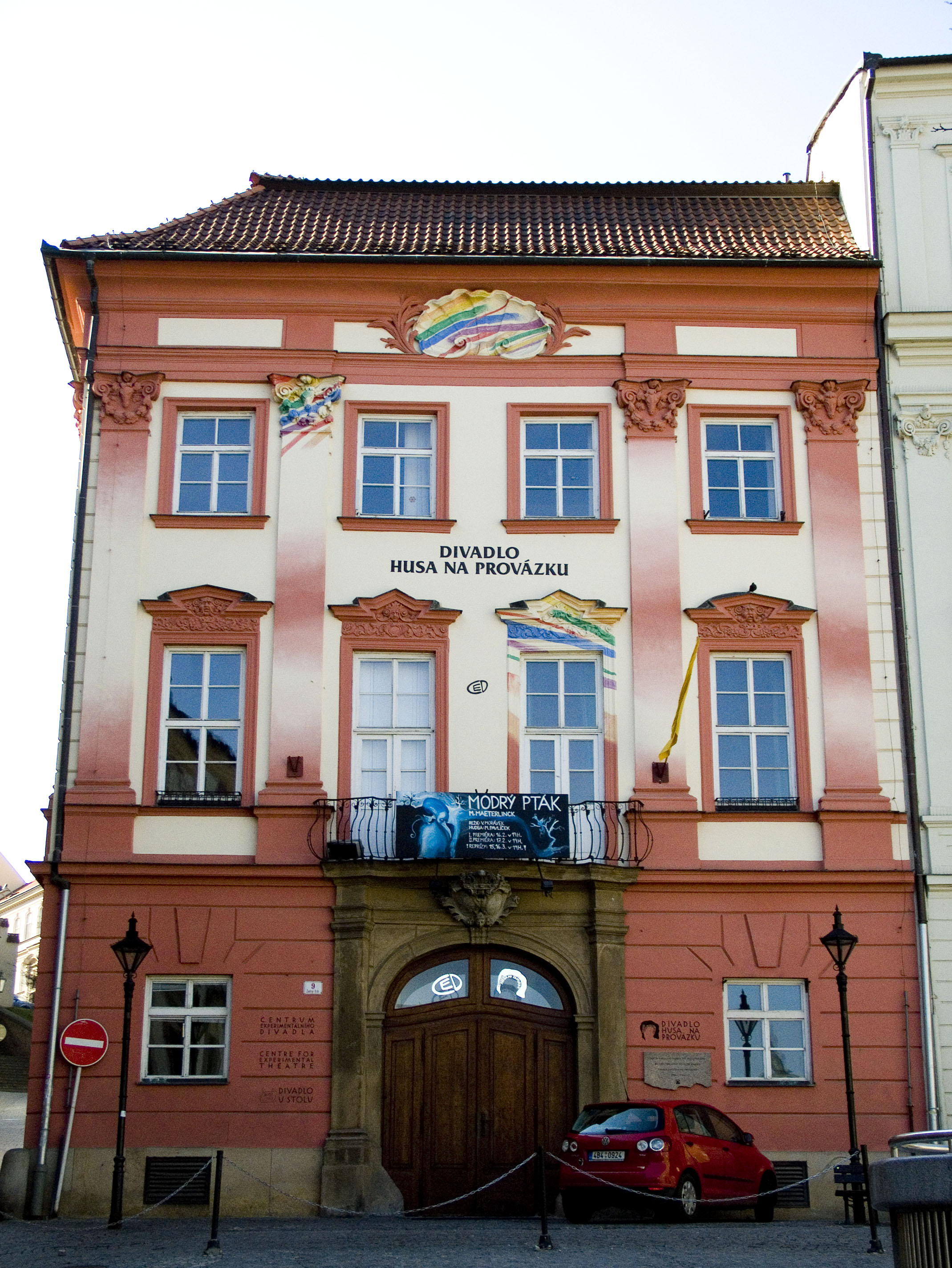 Divadlo Husa na provázku